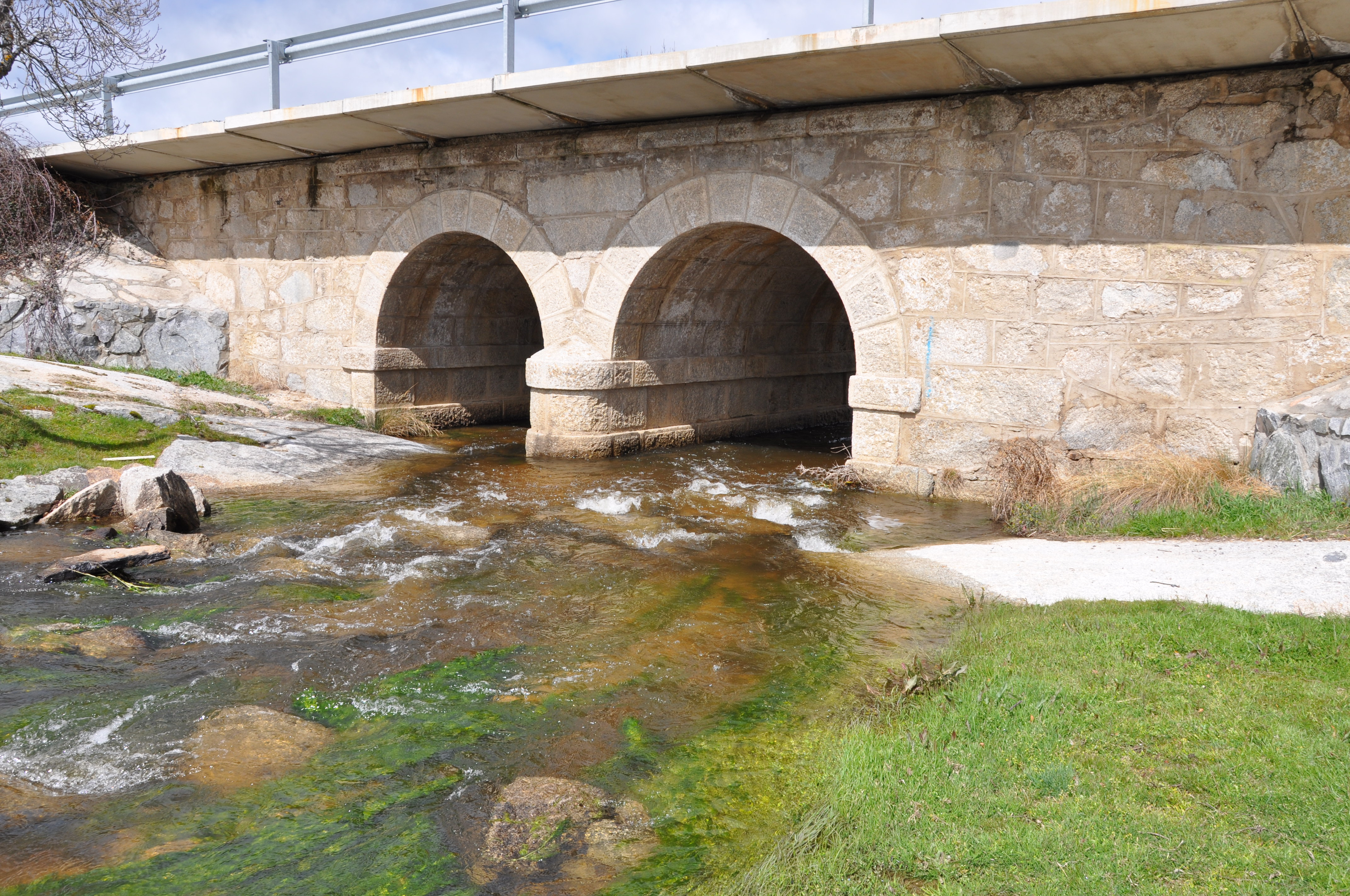 Río Margañán, Cabezas del Villar, Ávila, España